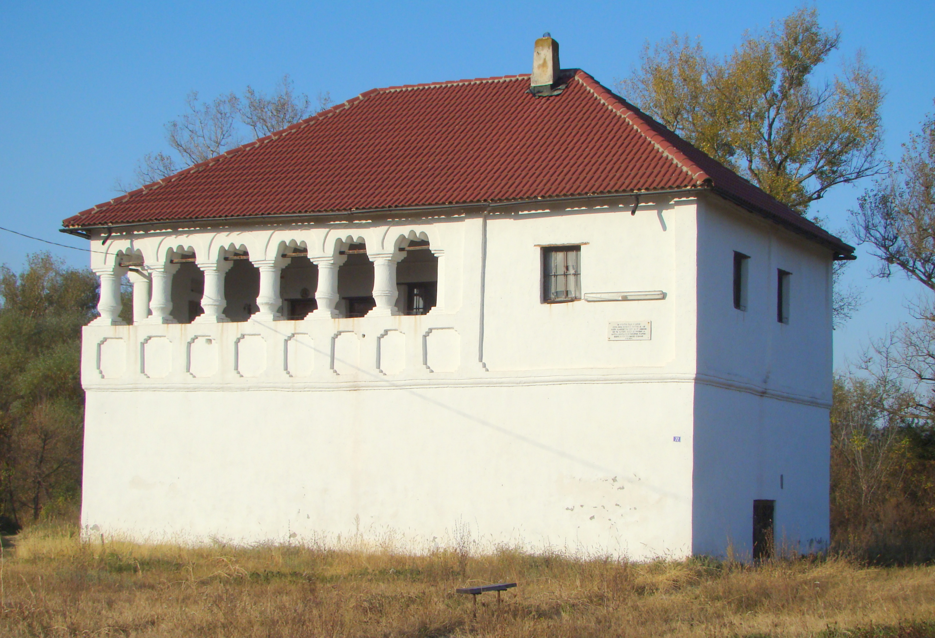 Cula Cuţui, sat Broşteni; comuna Broşteni la marginea satului, spre Motru 1815